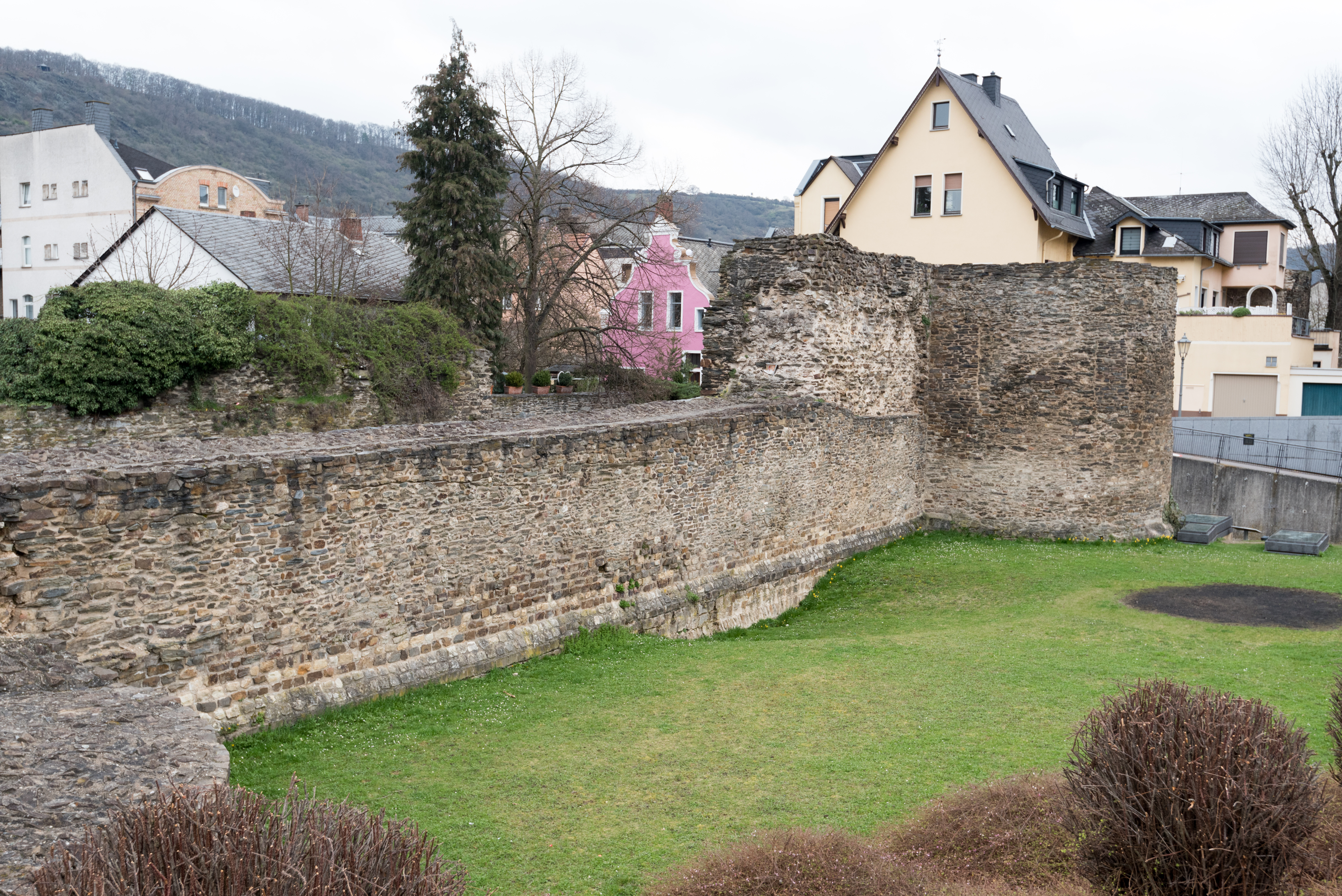 Boppard, Römisches Kastell